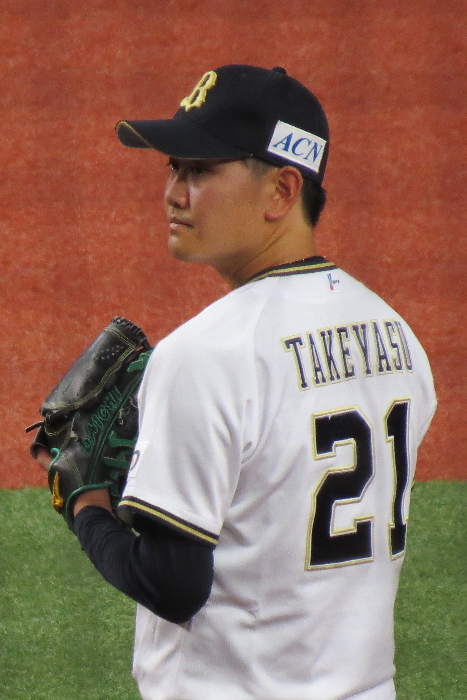 オリックスバファローズ竹安大知20190817